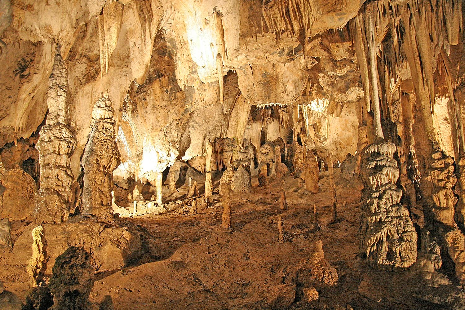 Sloupskosošůvské jeskyně - Eliščina síň